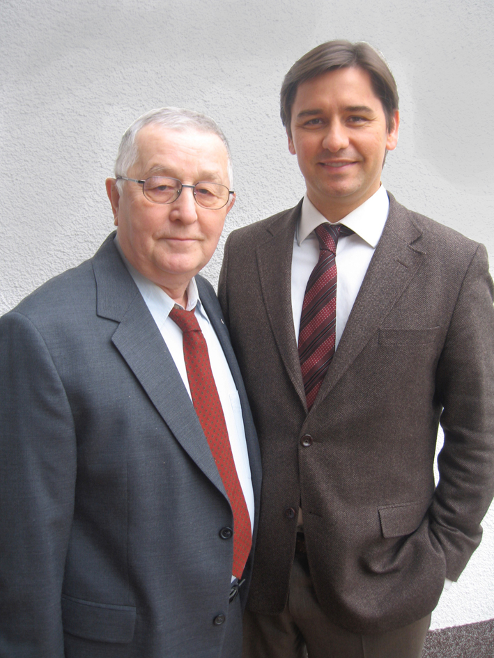 Foto der beiden Architekten Abdurrahman und Salim Yüksel